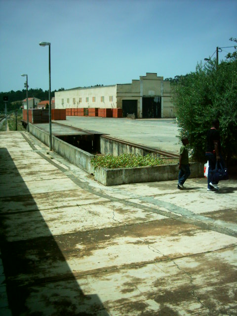 Estação ferroviária do Outeiro